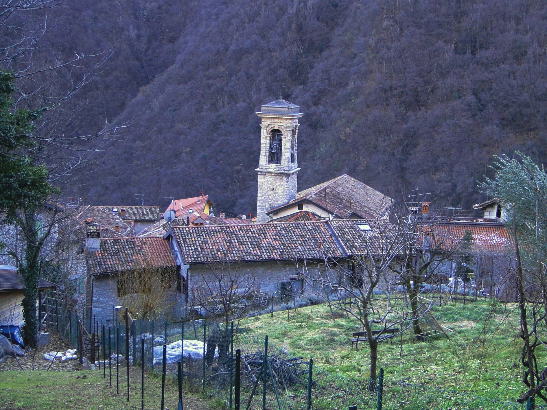 Scorcio di Olera, fraz. di Alzano Lombardo (BG), Italy.